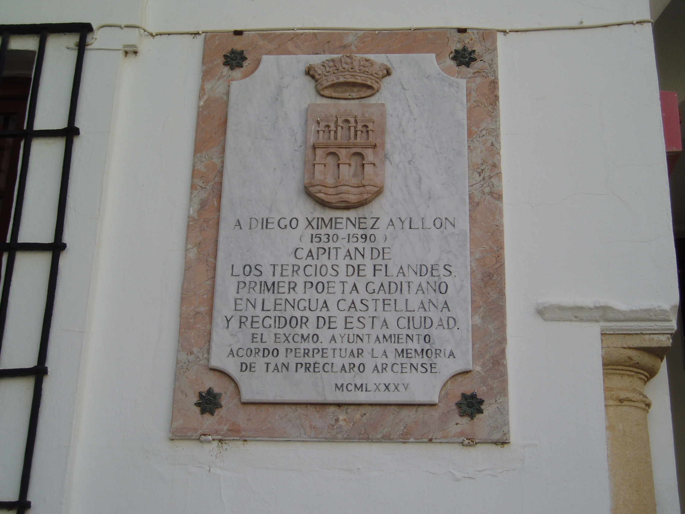 Placa dedicada al poeta andaluz Diego Jiménez de Ayllón (1530-1590), natural de Arcos de la Frontera, situada en su localidad natal.